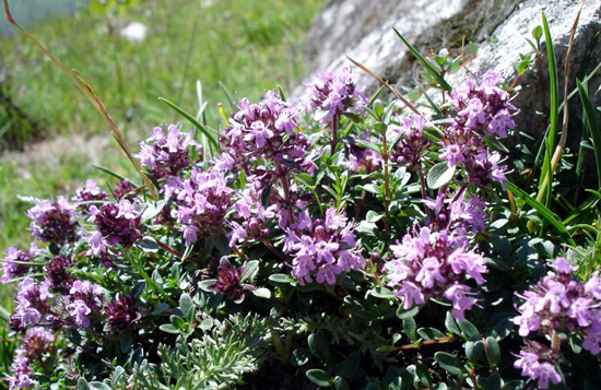 Wilder Thymian (Thymus serpyllum)